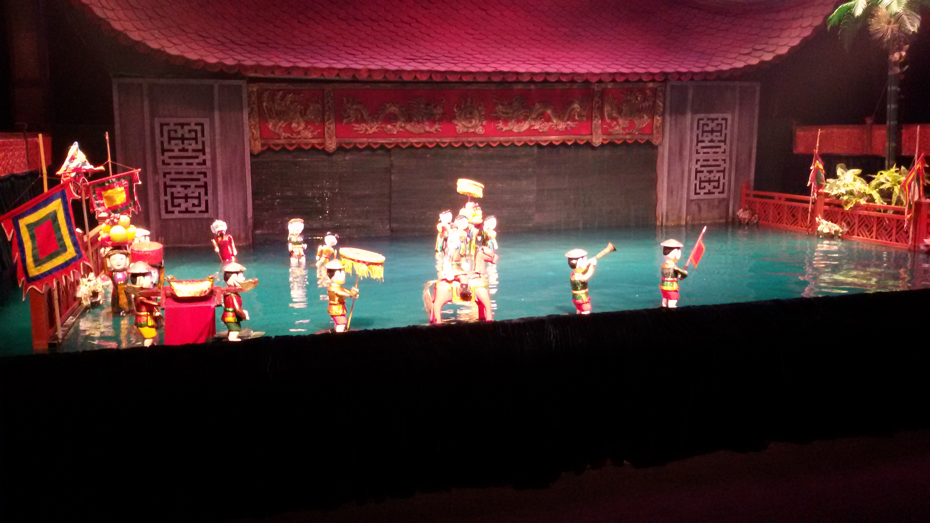 Water Puppet Show in progress